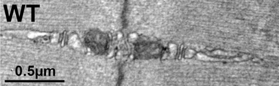 Figura 2. (E) Análisis ultraestructural revela túbulos T. El músculo contiene en 1 unidad de tríada, un túbulo T y dos túbulos de retículo sarcoplásmico. Músculo de rata de 8 semanas de edad. Teñidas con ferricianuro de potasio para colorear las estructuras del túbulo T en negro. Barra de Escala 0.5μm.